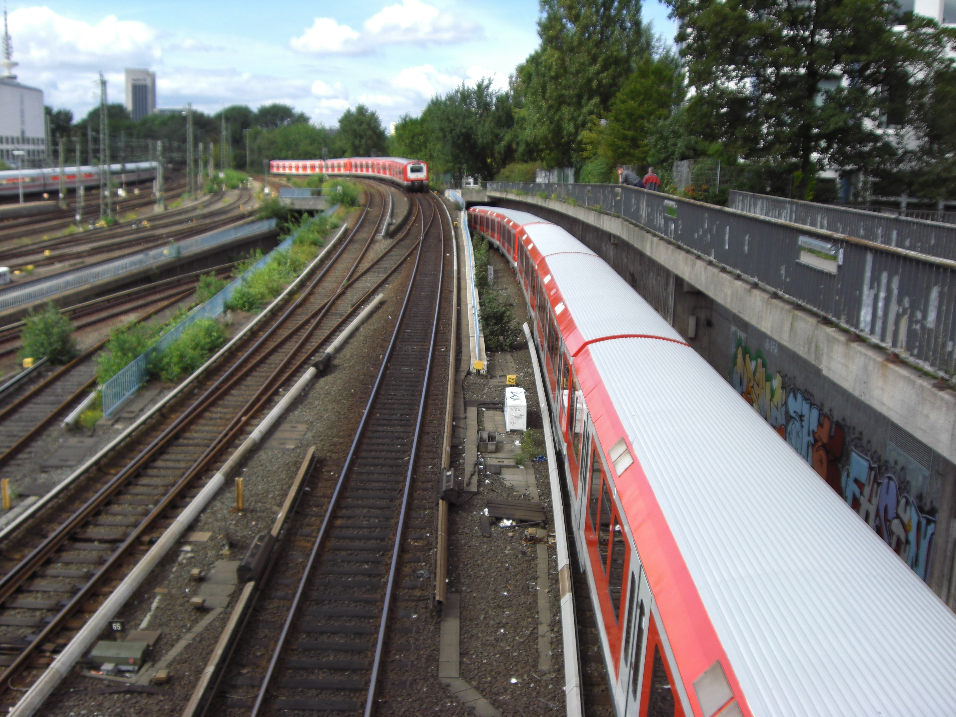 Züge der Hamburger S-Bahn verzweigen sich auf die Verbindungsbahn (links) und die City-S-Bahn (rechts) nordwestlich des Hauptbahnhofes.